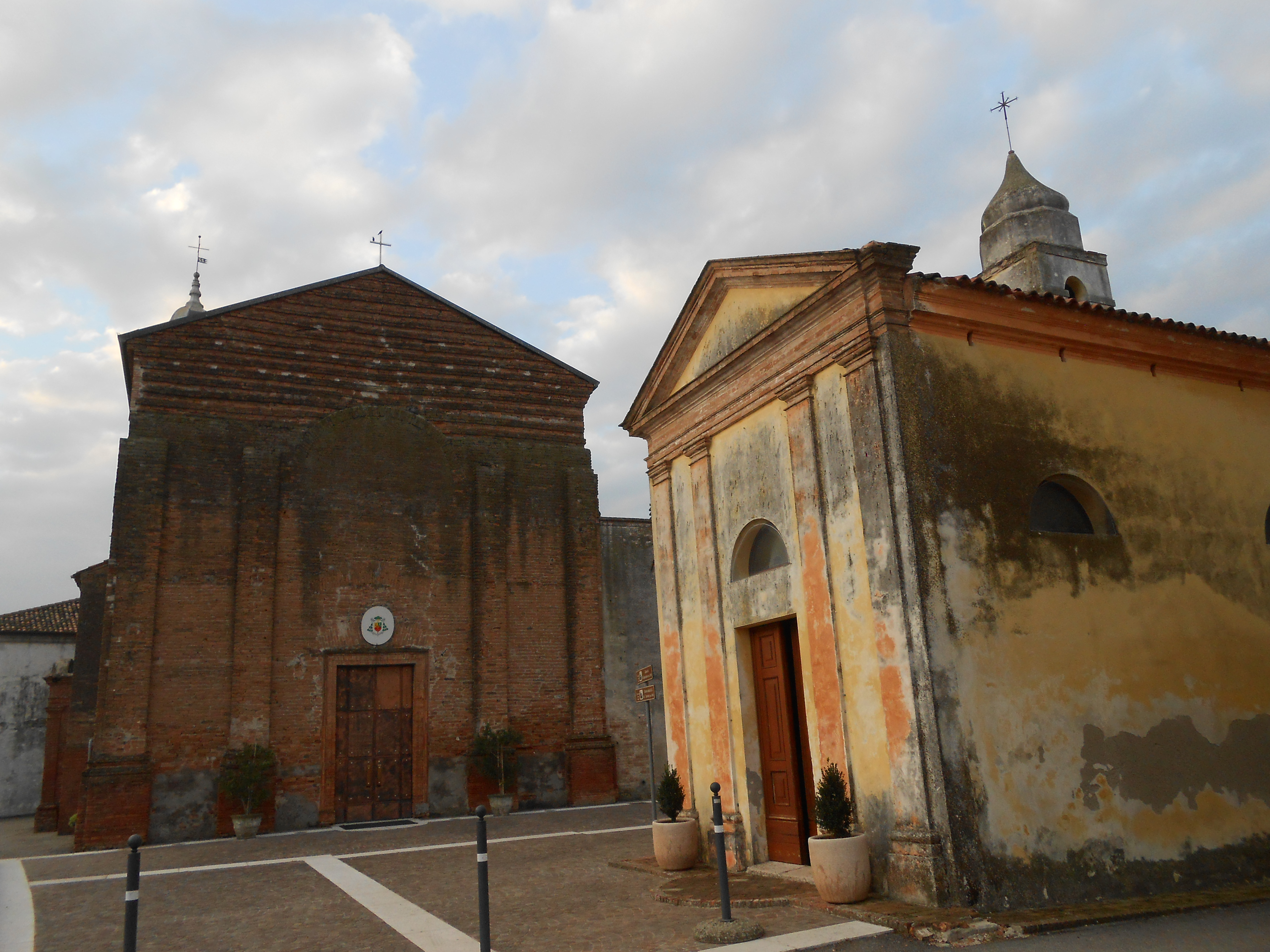 chiesa di San Sebastiano Martire, oratorio della B.V. del Carmine, Crocetta, Badia Polesine